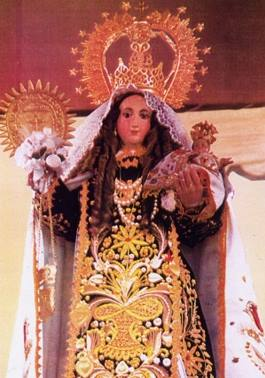 la virgen del carmen, es la patrona de el distrito de el Carmen ubicada en la provincia de Chincha.